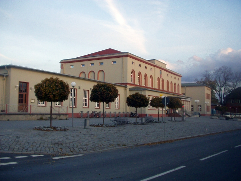 Bahnhof Aschersleben 2004 nach abgeschlossener Renovierung